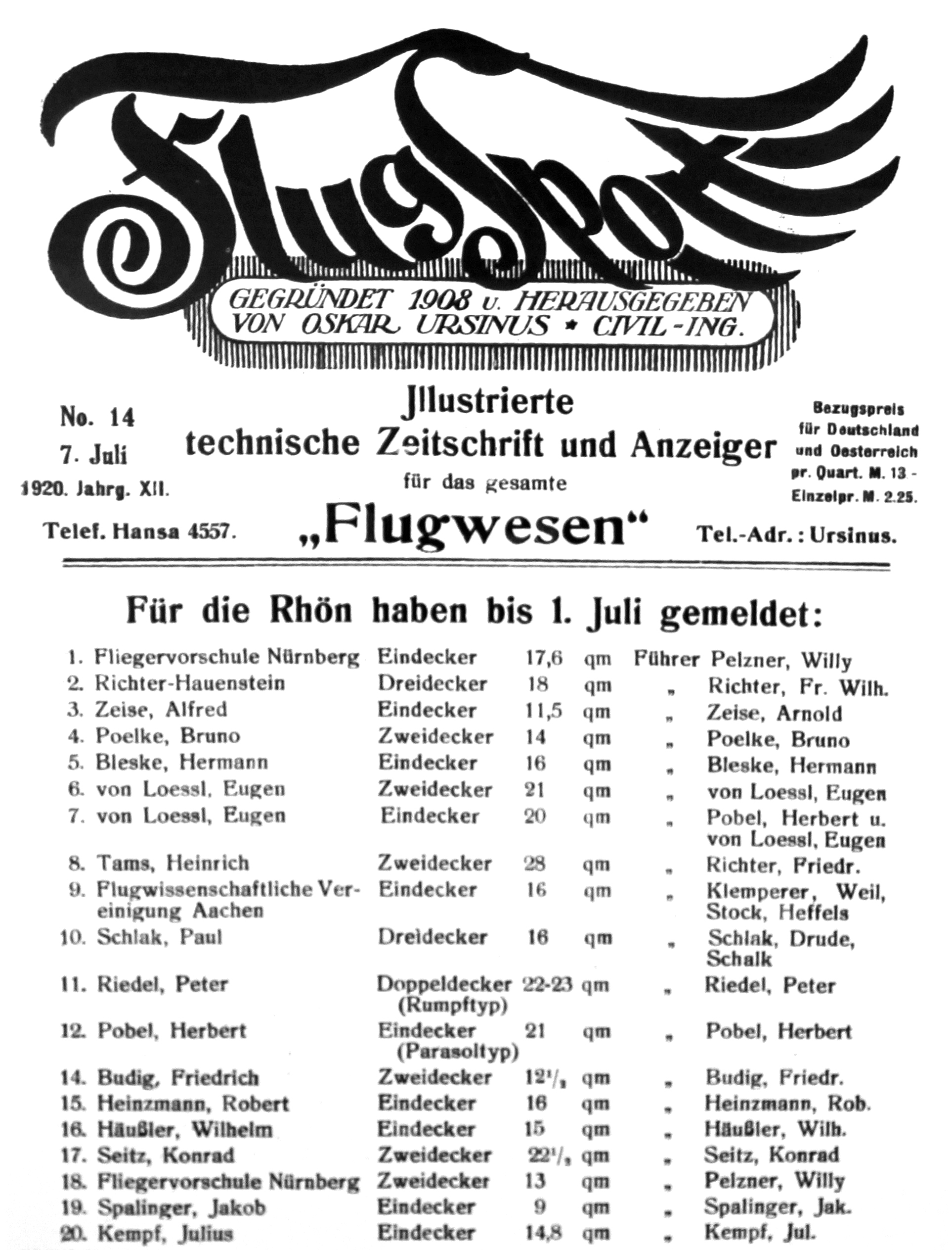 Titelseite der Flugsport vom 7. Juli 1920; XII. Jahrgang